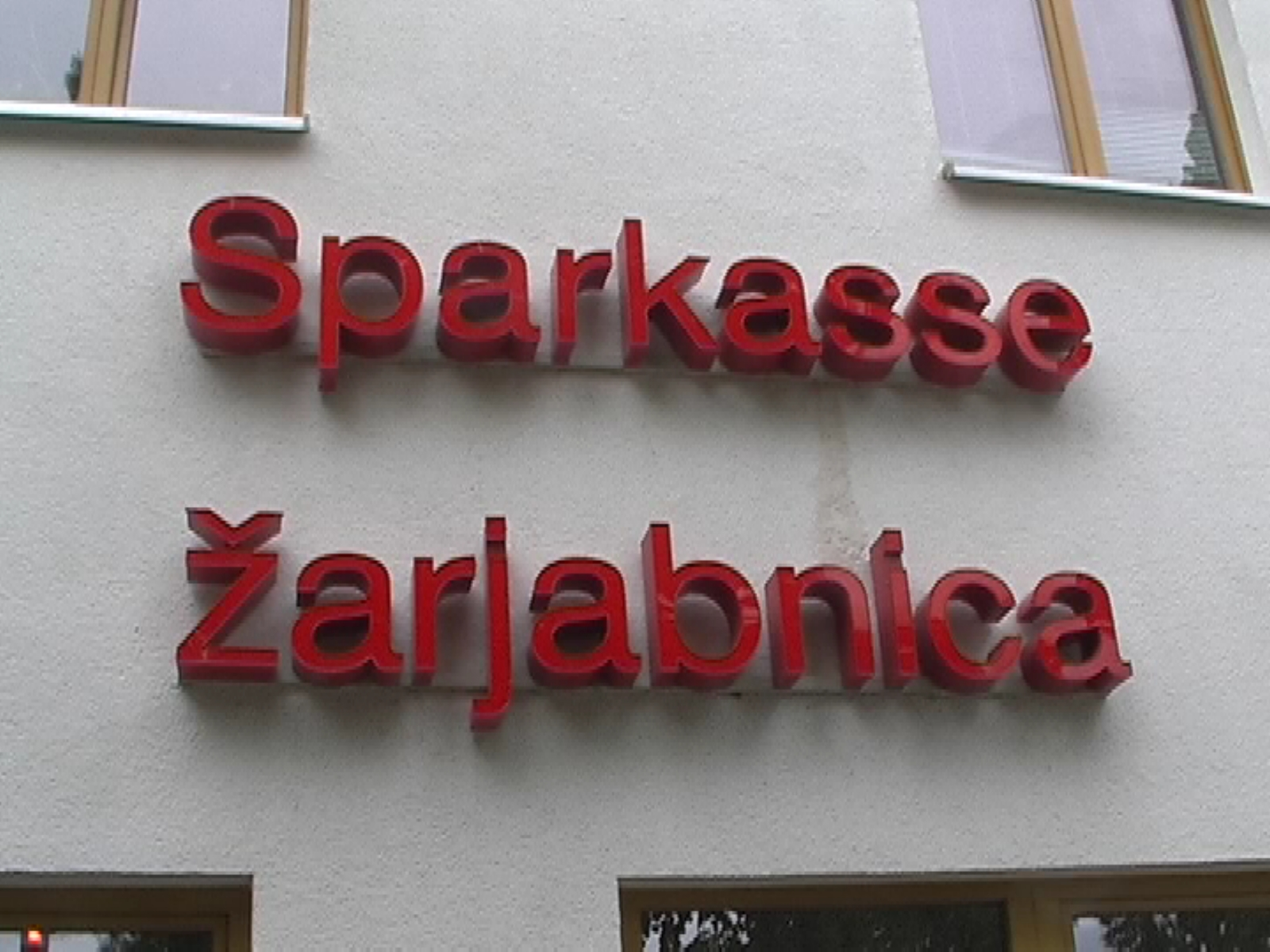 lutowarnja, Borkowy (Błóta)